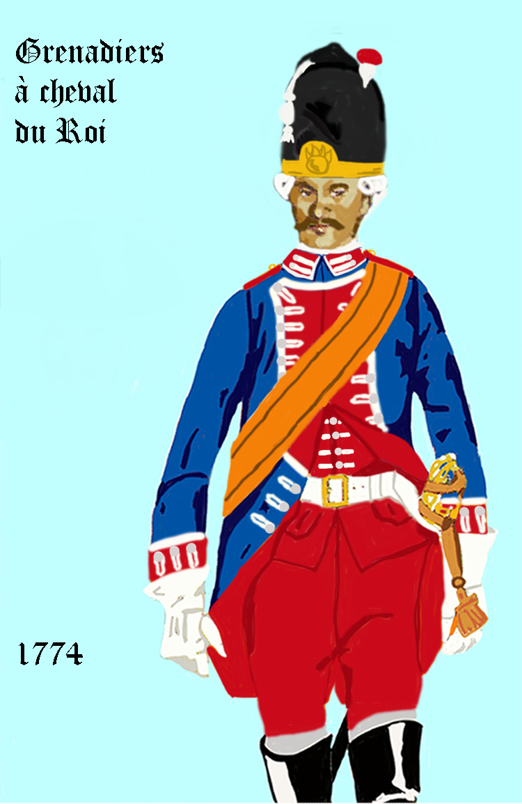 Reitende Grenadiere des Königs